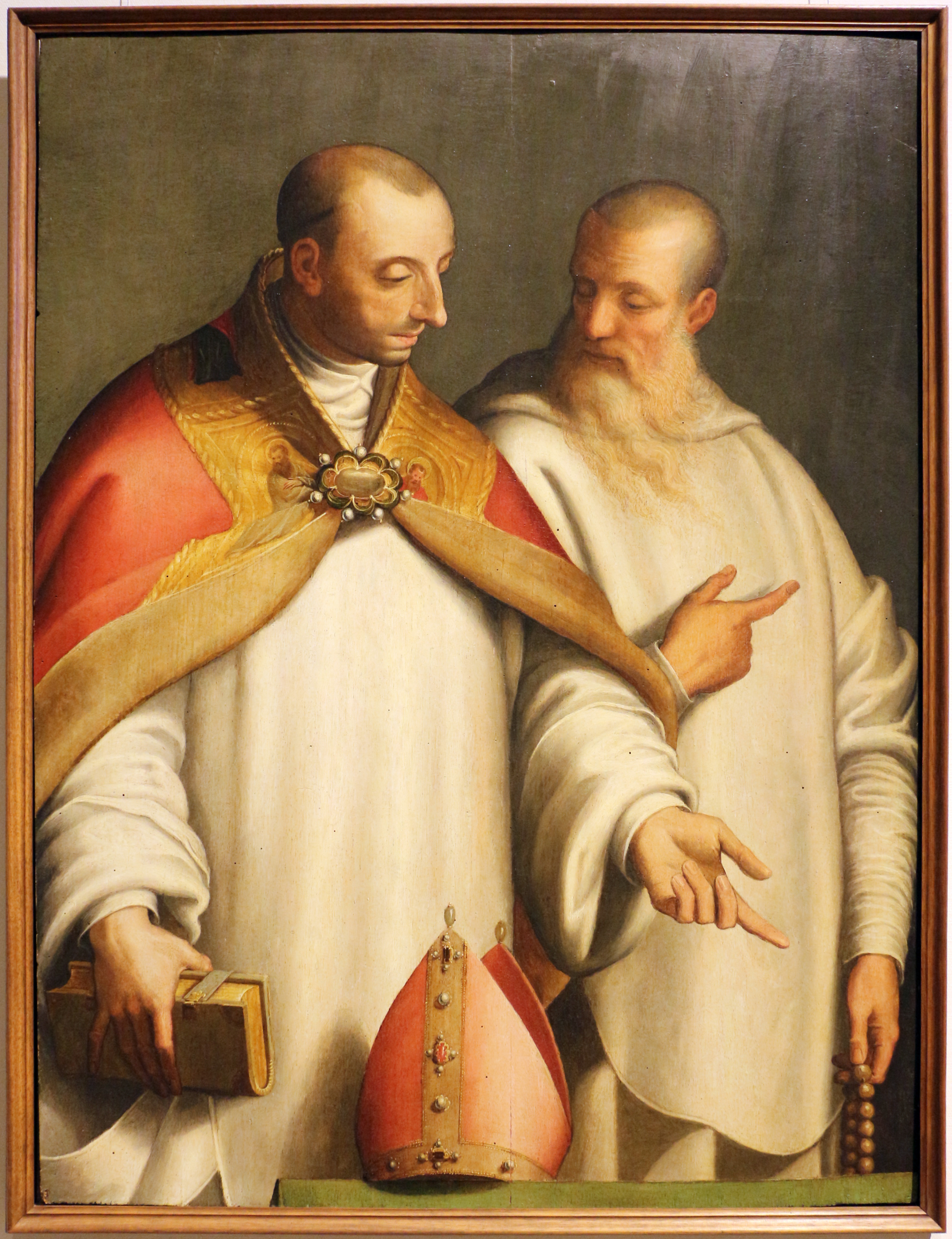 s. ugo di lincoln e il beato guglielmo da fenogliotitle QS:P1476,it:"s. ugo di lincoln e il beato guglielmo da fenoglio" label QS:Lit,"s. ugo di lincoln e il beato guglielmo da fenoglio"